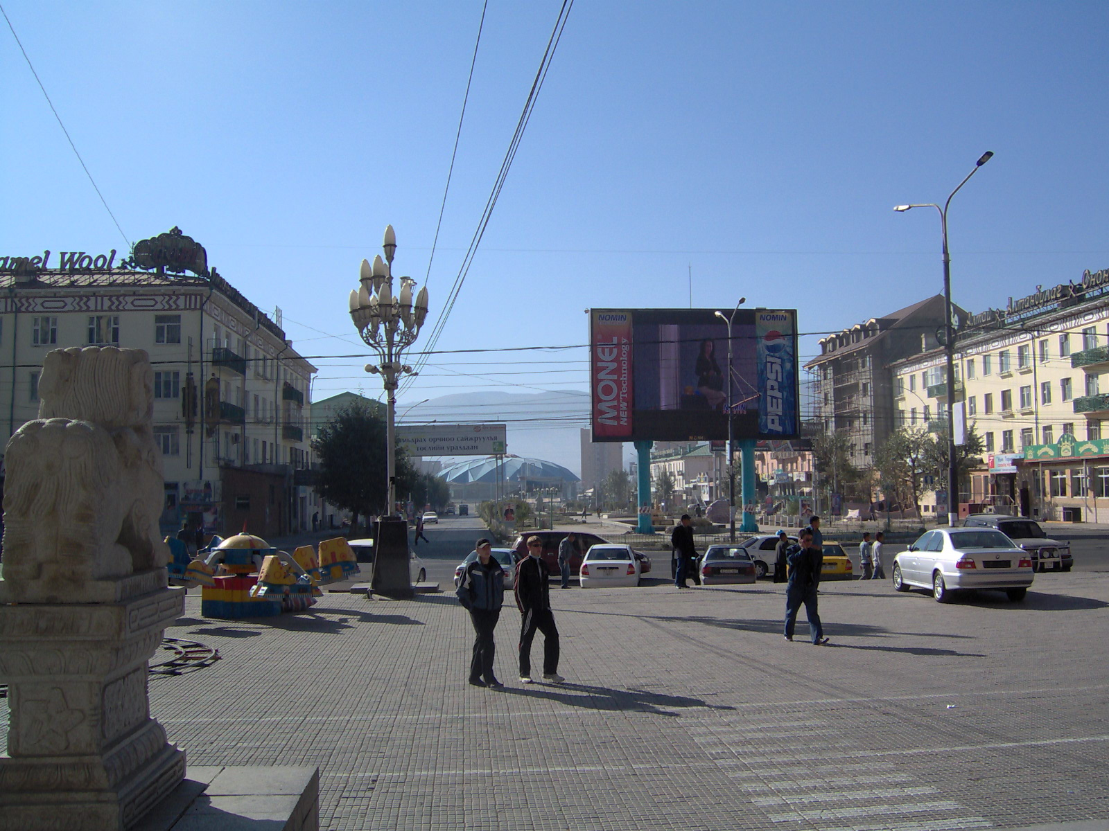 Ulaanbaatar